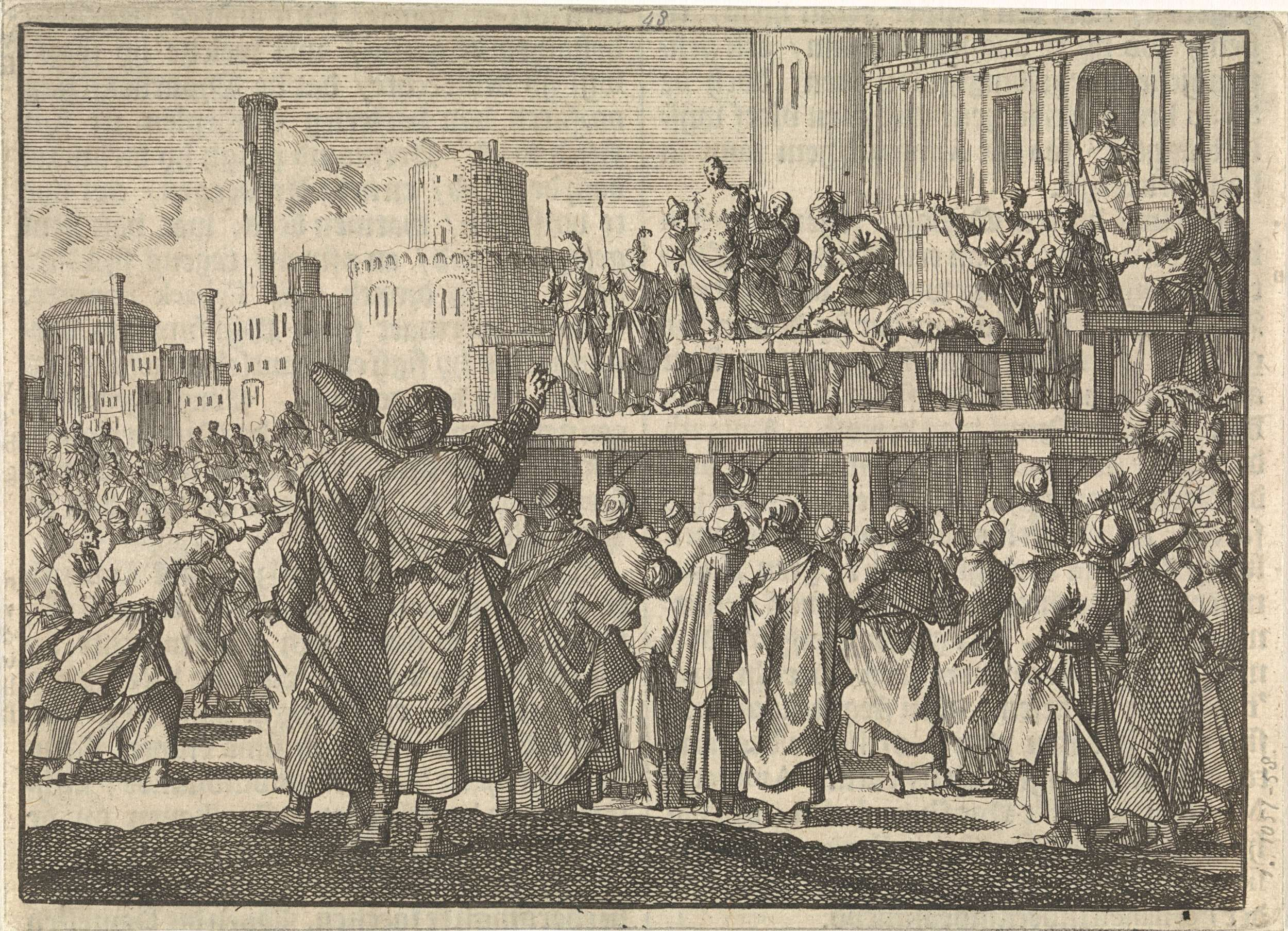 Sultan Murat IV laat van twee mannen armen en benen afhakken omdat zij hadden gerookt, ca. 1630